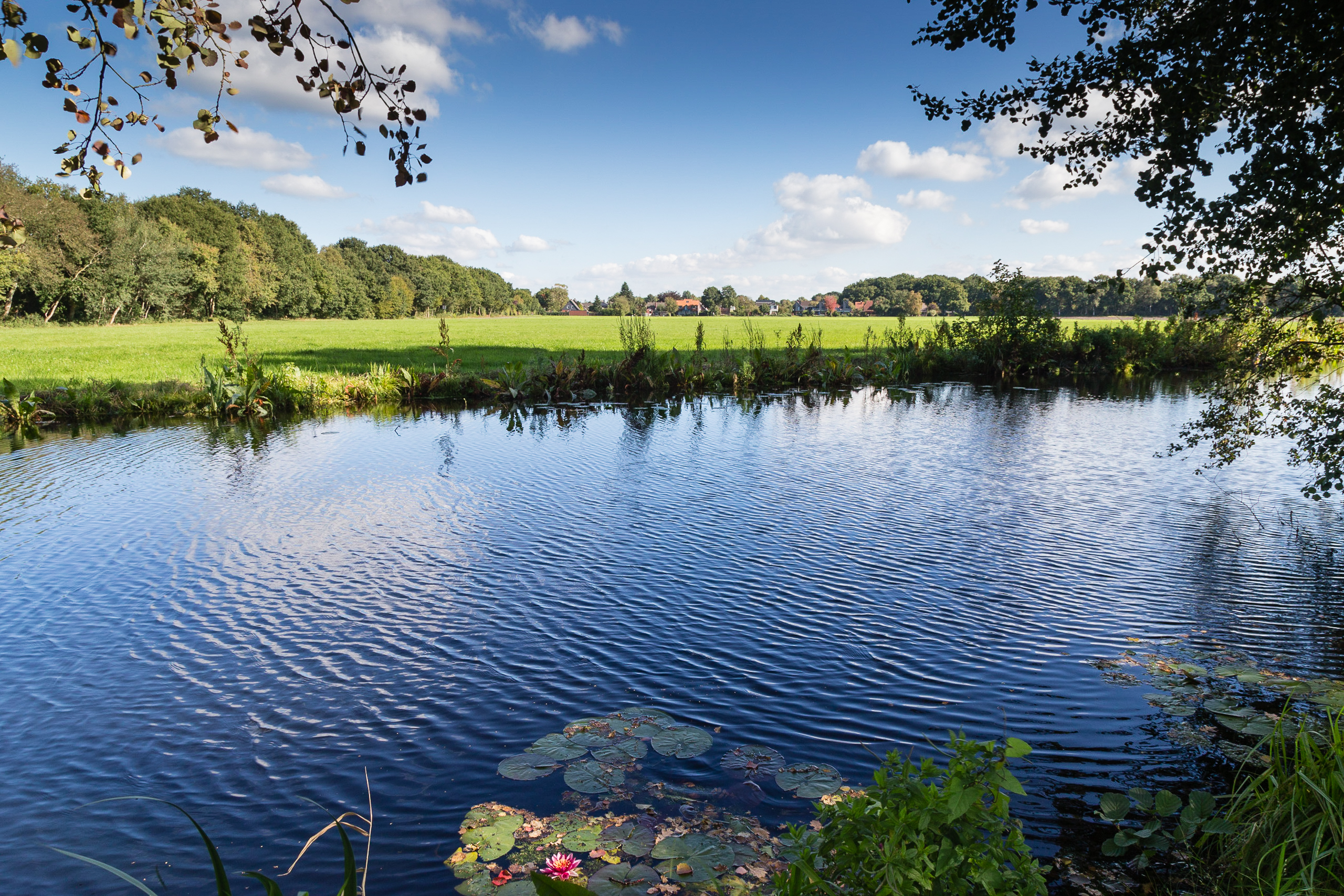 Am Querkanal bei Hundmühlen